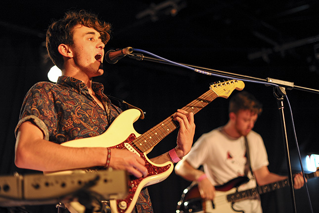 WAMi Festival 2012